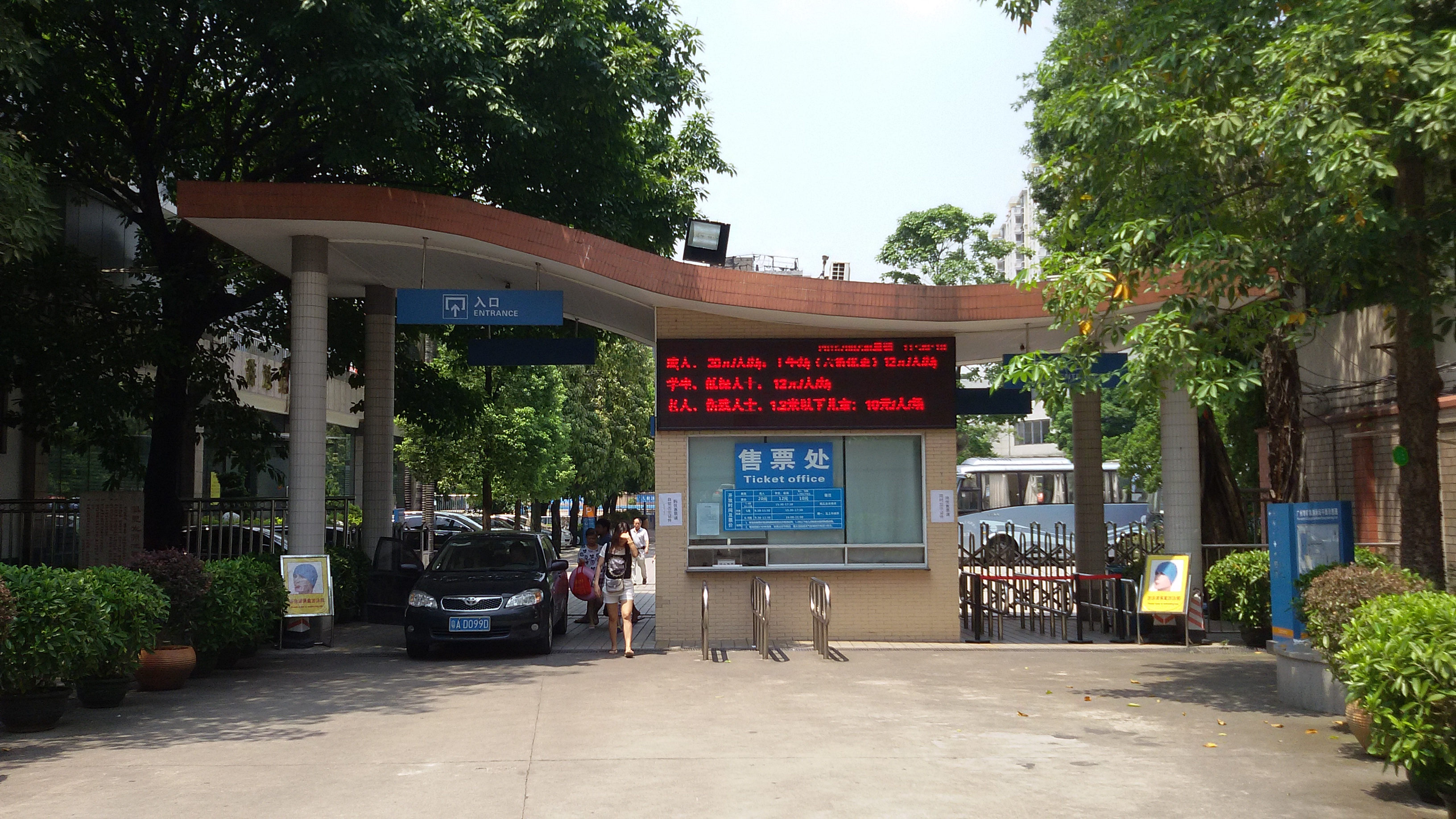 粵語: 矿泉泳场嘅大门口